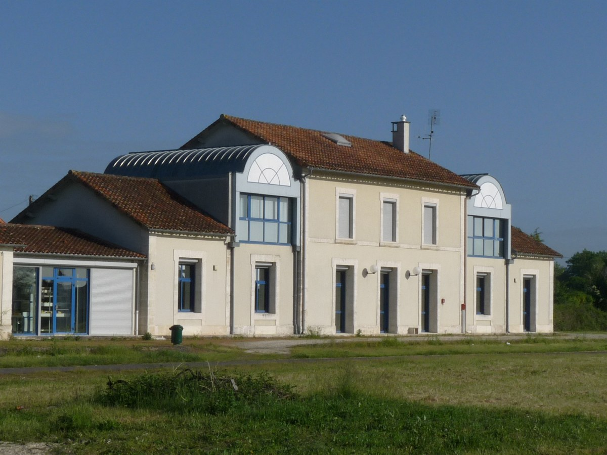 Ancienne gare, médiathèque de Barbezieux, Charente, France